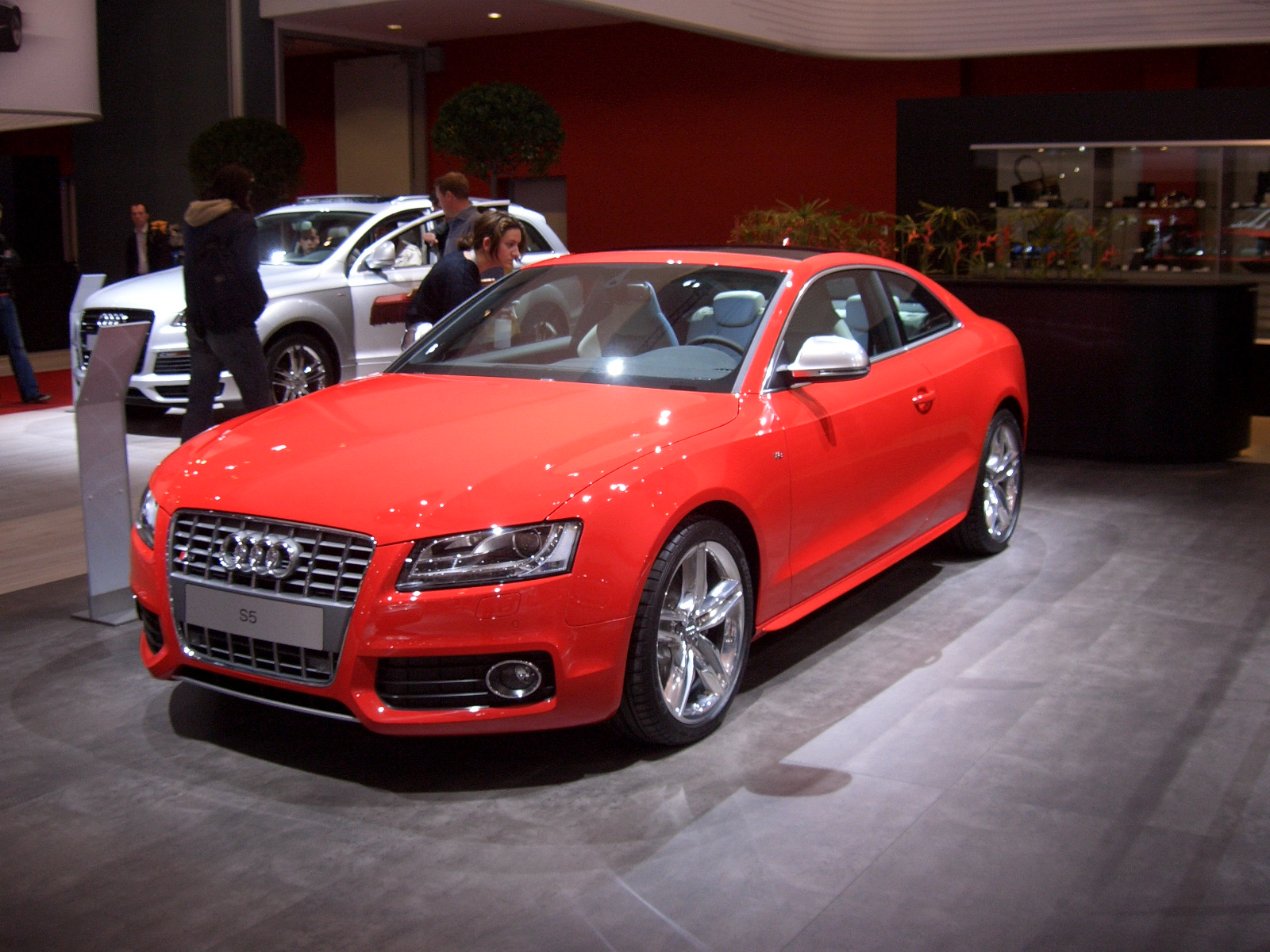 Ауди S5 на изложението на Volkswagen Group през април 2007 в Хамбург Автор: HSV Източник: собствена снимка